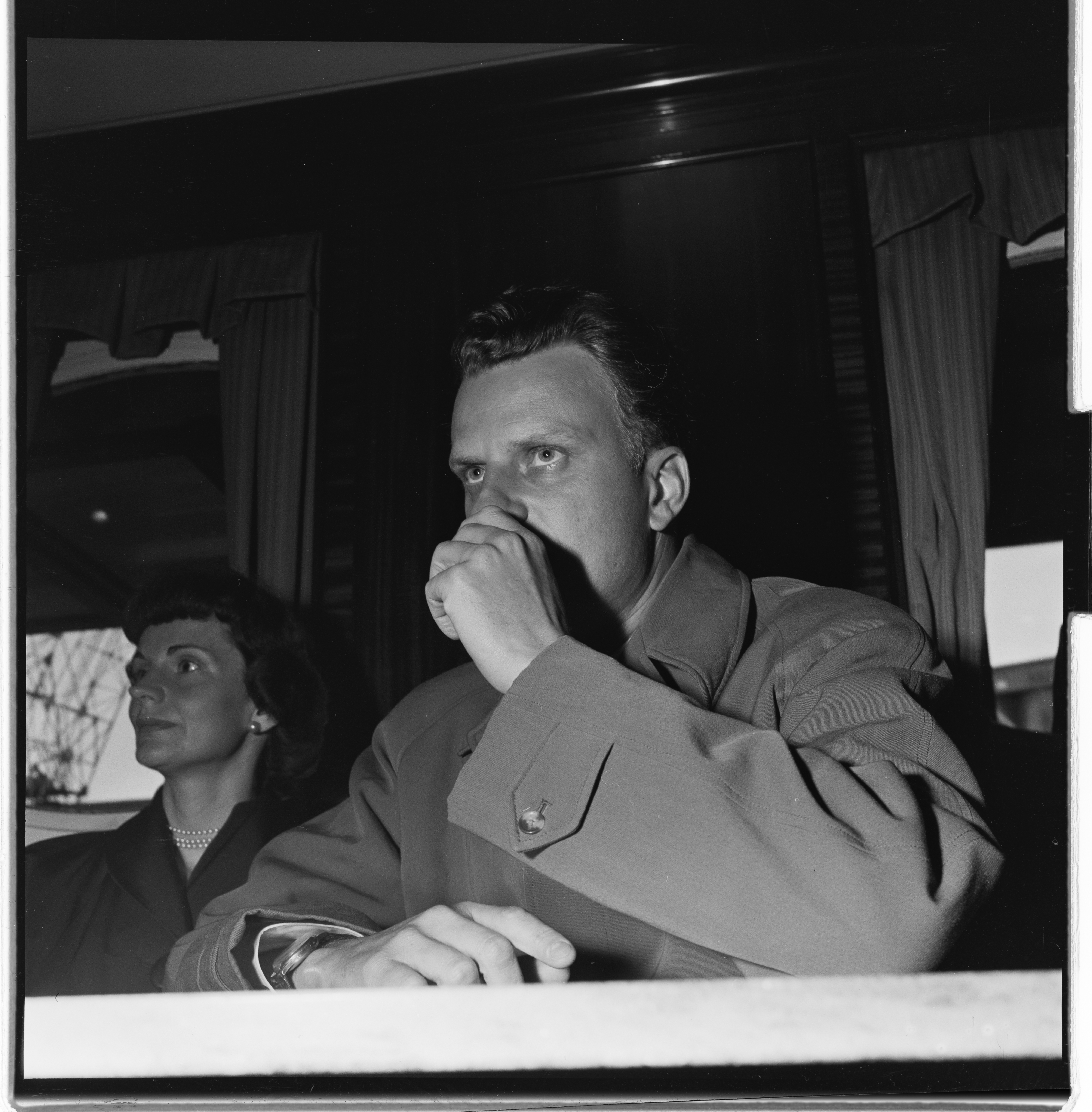 Bildet er hentet fra Arkivverket. Billy Graham Arkivinstitusjon : Riksarkivet Arkivnavn : Billedbladet NÅ Sted : Norge, Oslo, Oslo, Emneord: kristendom, forkynnelse, møter Avbildet: Graham, Billy